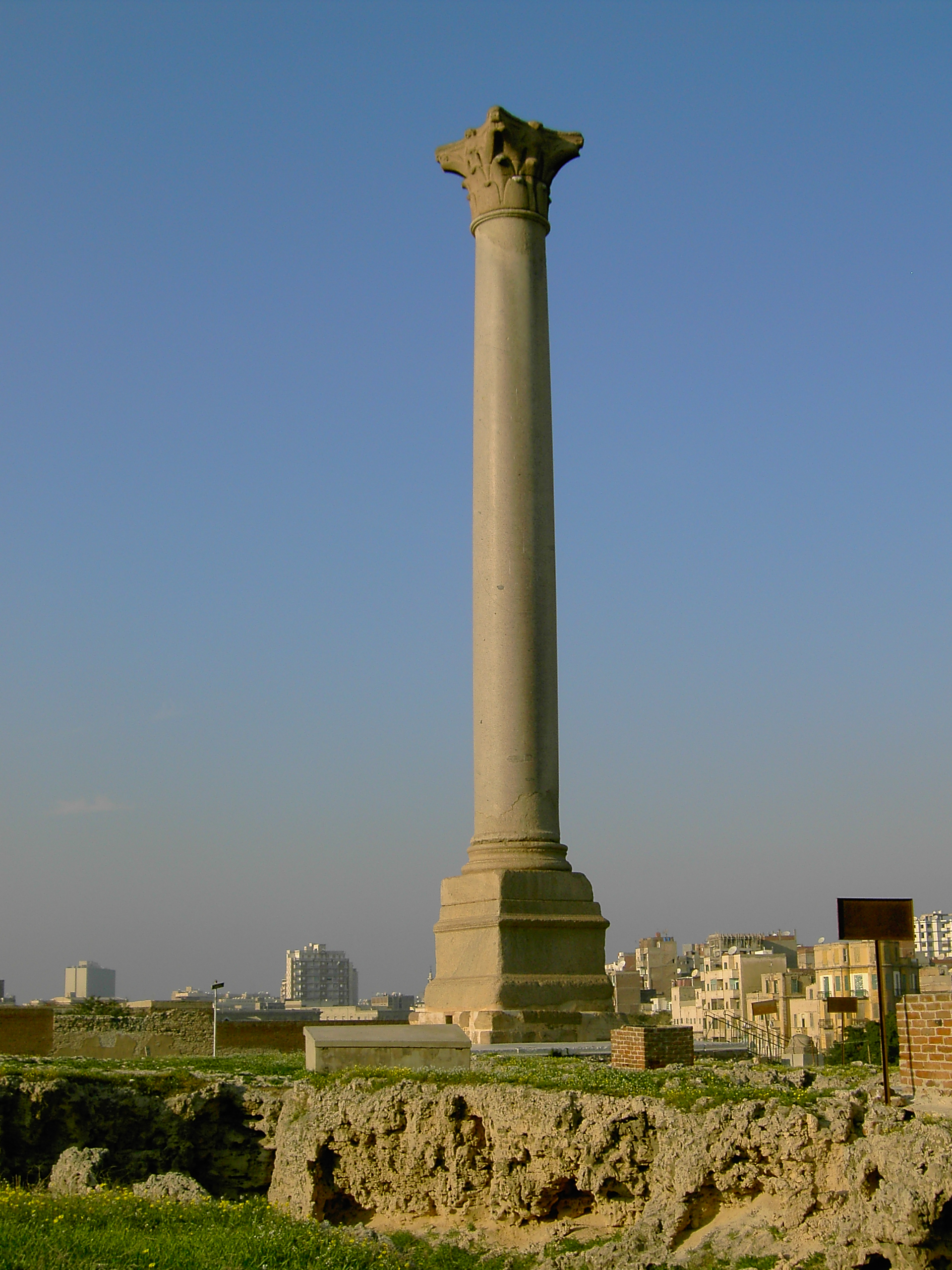 Pompey's Pillar. Photo personnelle d'Alexandrie